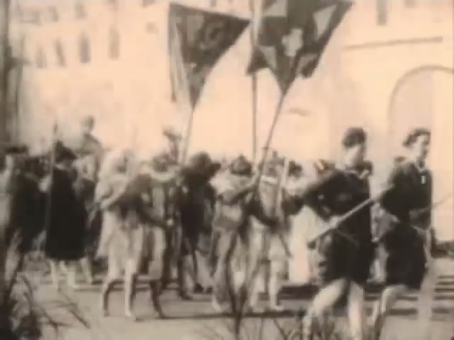 Imagen de la película Ben-Hur.